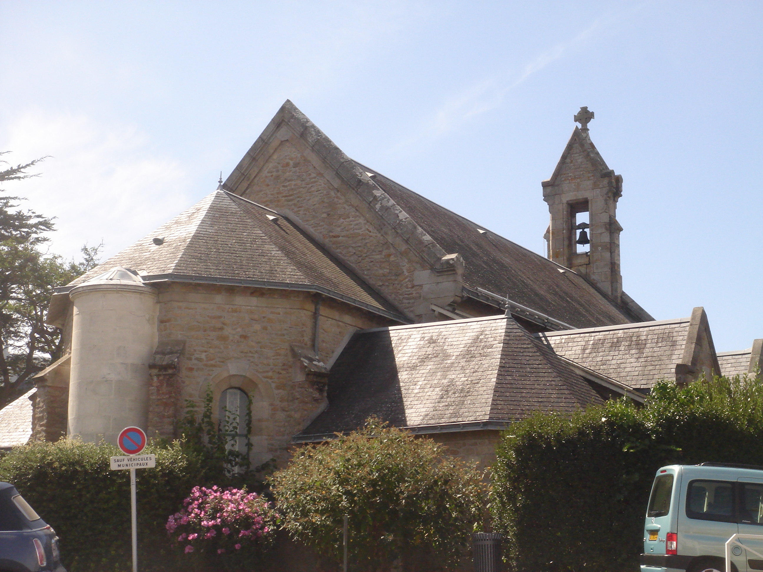 Chapelle Sainte-Anne de La Baule-Escoublac, Loire-Atlantique, France